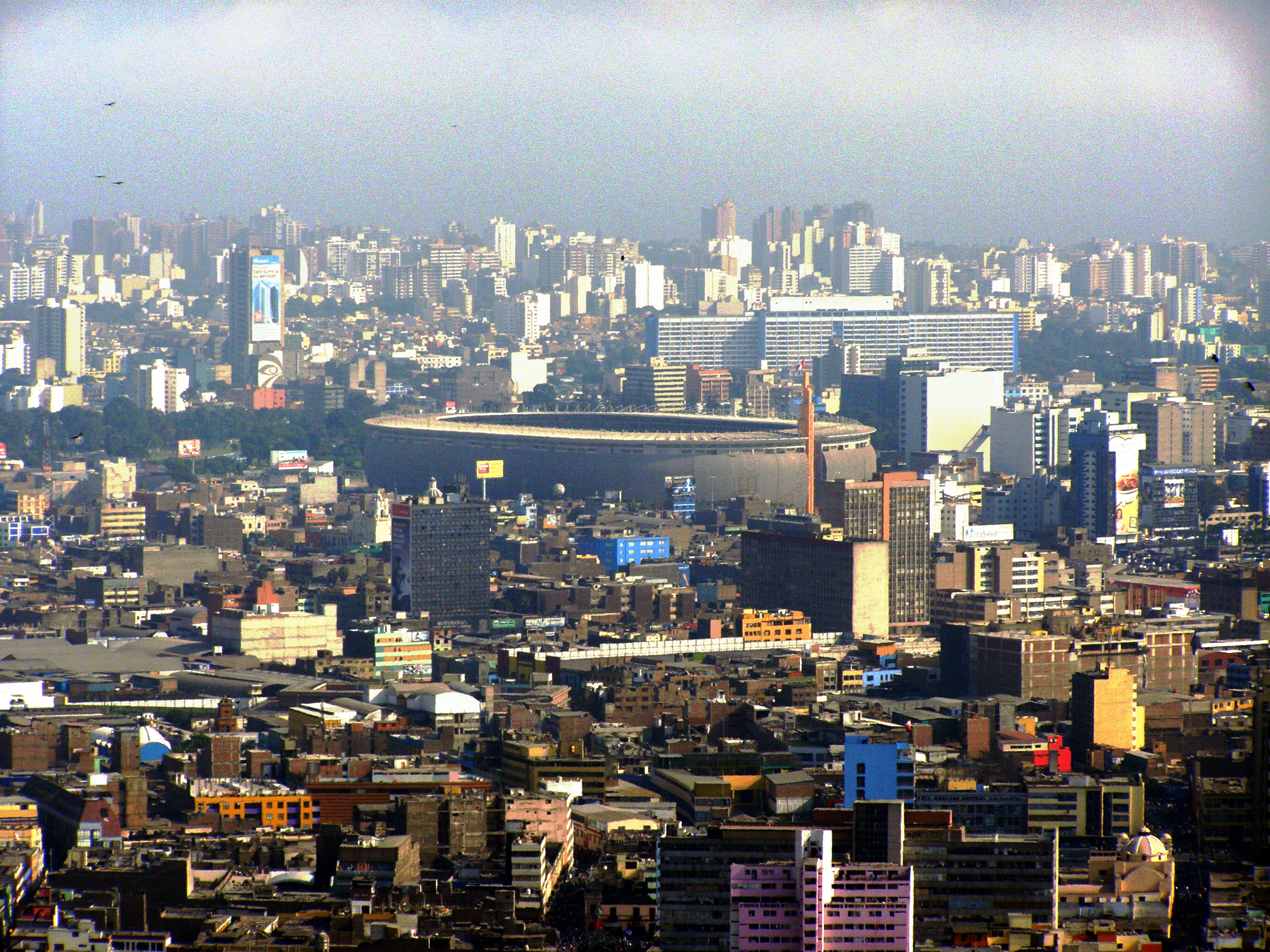 Lima, Perú